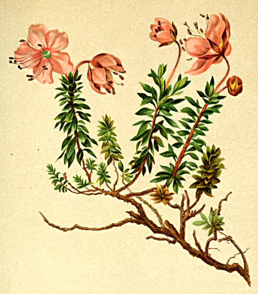 Rhododendron chamaecistus (= Rhodothamnus chamaecistus)